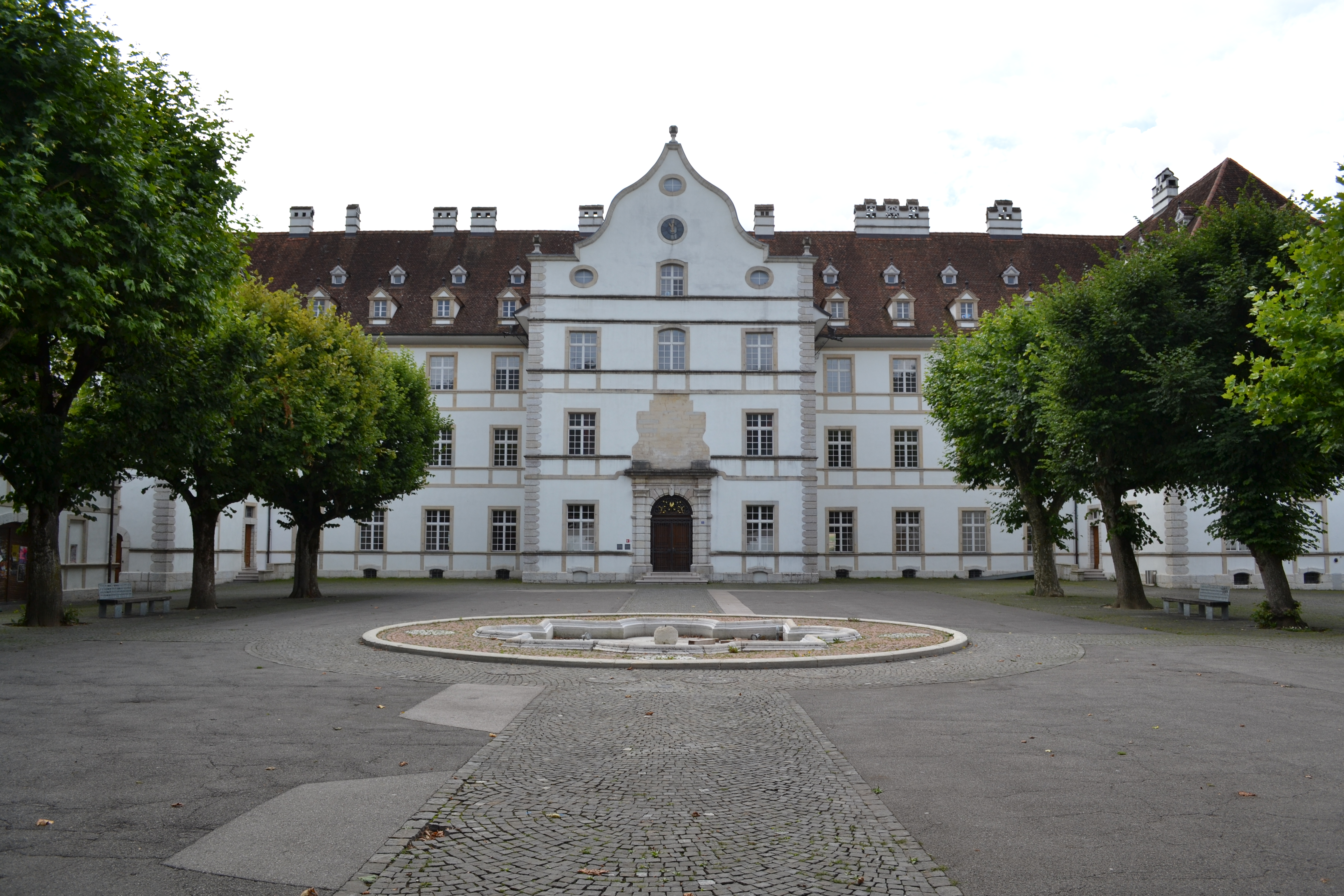 Château épiscopal de Delémont, résidence d'été des Princes-Evêques de Bâle.